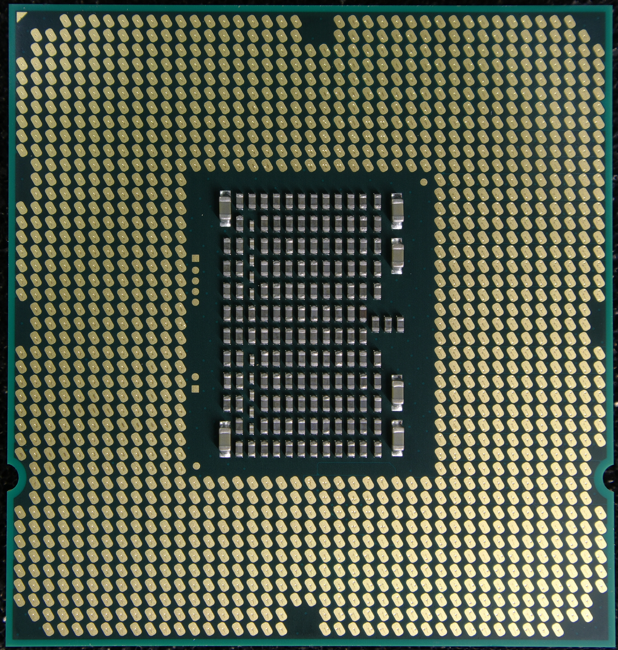 Intel core i7-970 Unterseite